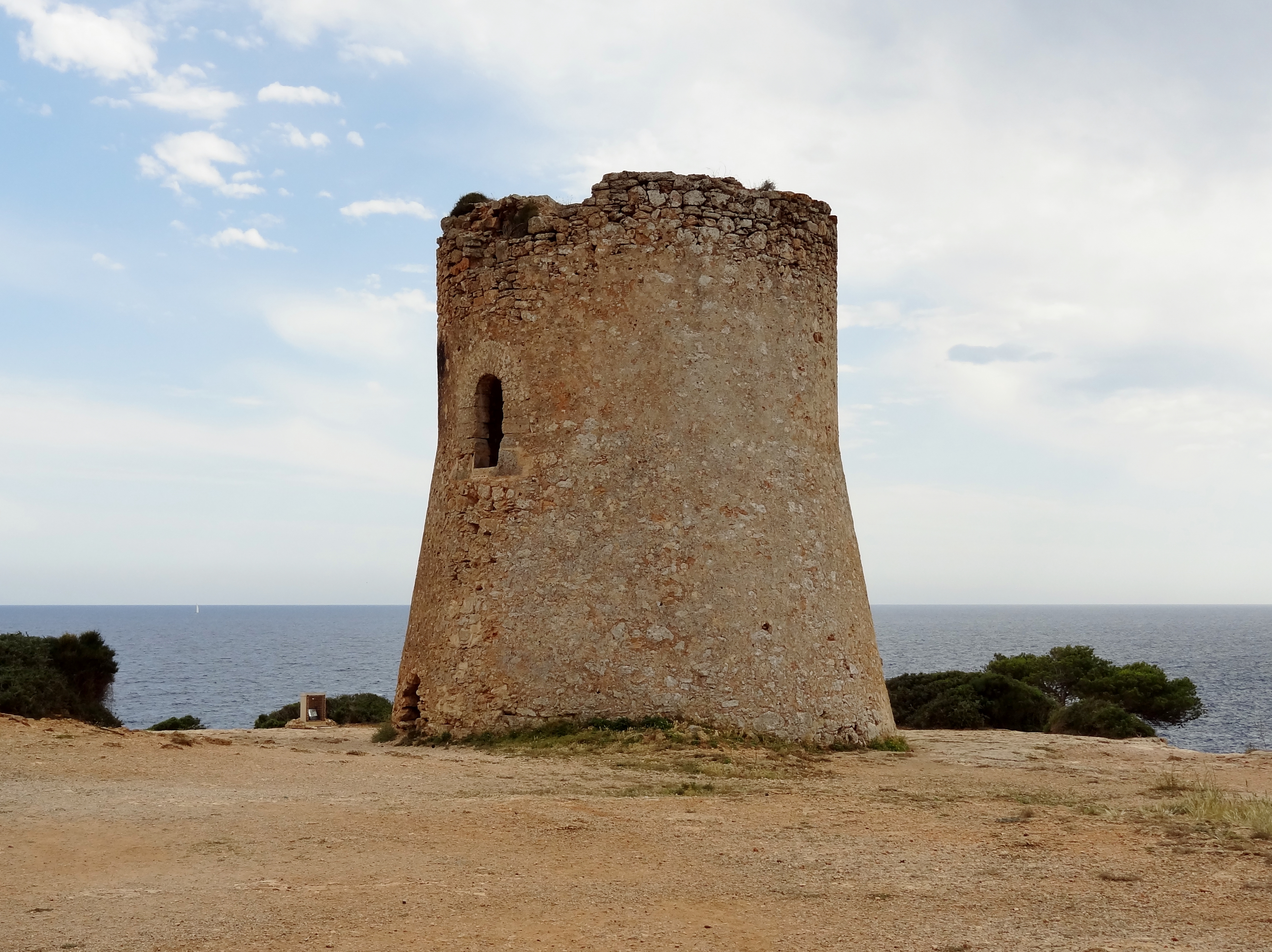 Torre de Vigia de Cala Pi (Wachturm von Cala Pi), erbaut 1543, Gemeinde Llucmajor, Mallorca, Spanien